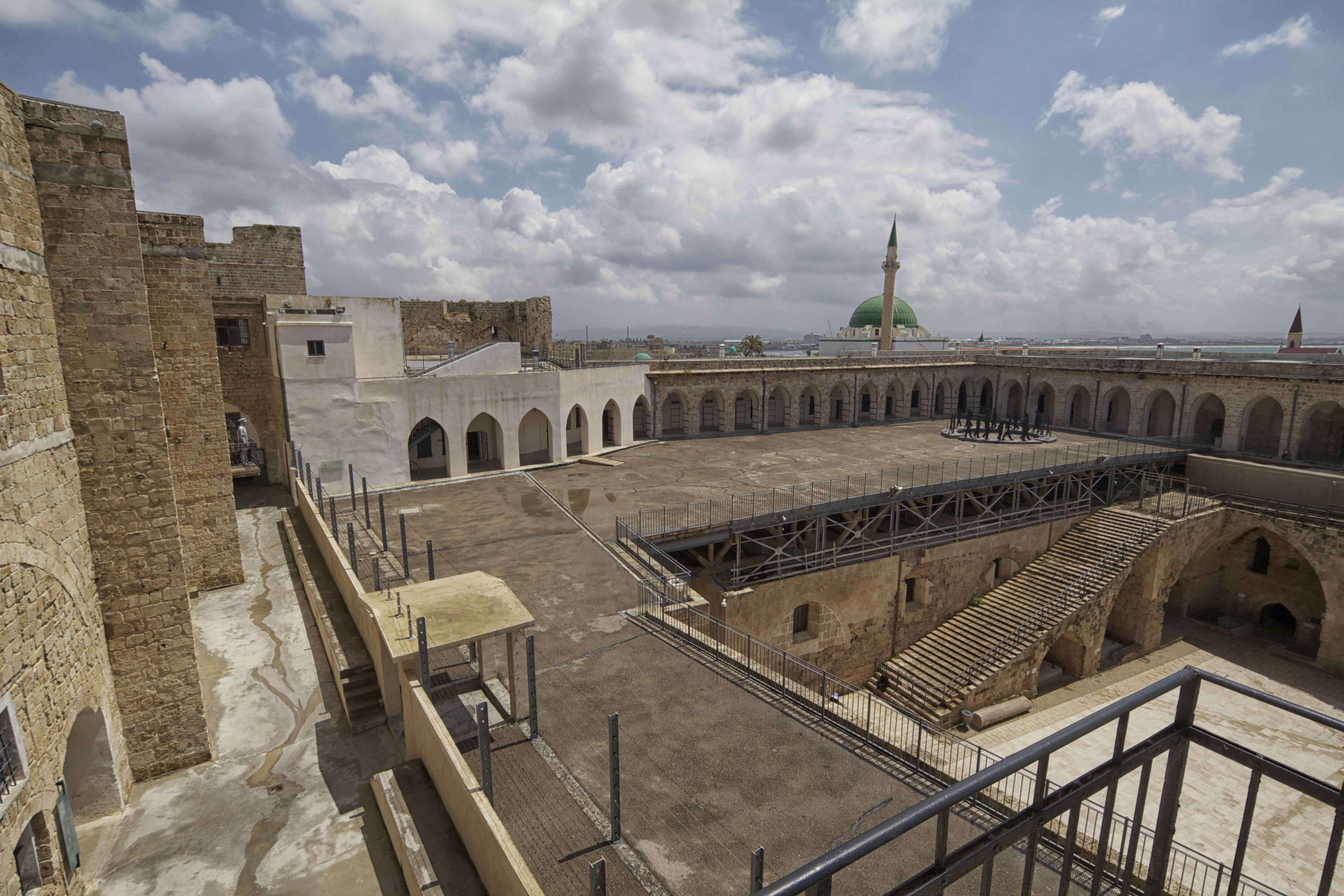 מוזיאון אסירי המחתרות בעכו הוא מוזיאון הנצחה לחברי המחתרות העבריות בתקופת המנדט הבריטי, שנכלאו בכלא עכו. המוזיאון משוכן במבצר עכו אשר נבנה בתקופה העות'מאנית. המבצר שימש בתקופת השלטון העות'מאני כבסיס צבאי, מעון מושל עכו ואף בית סוהר.